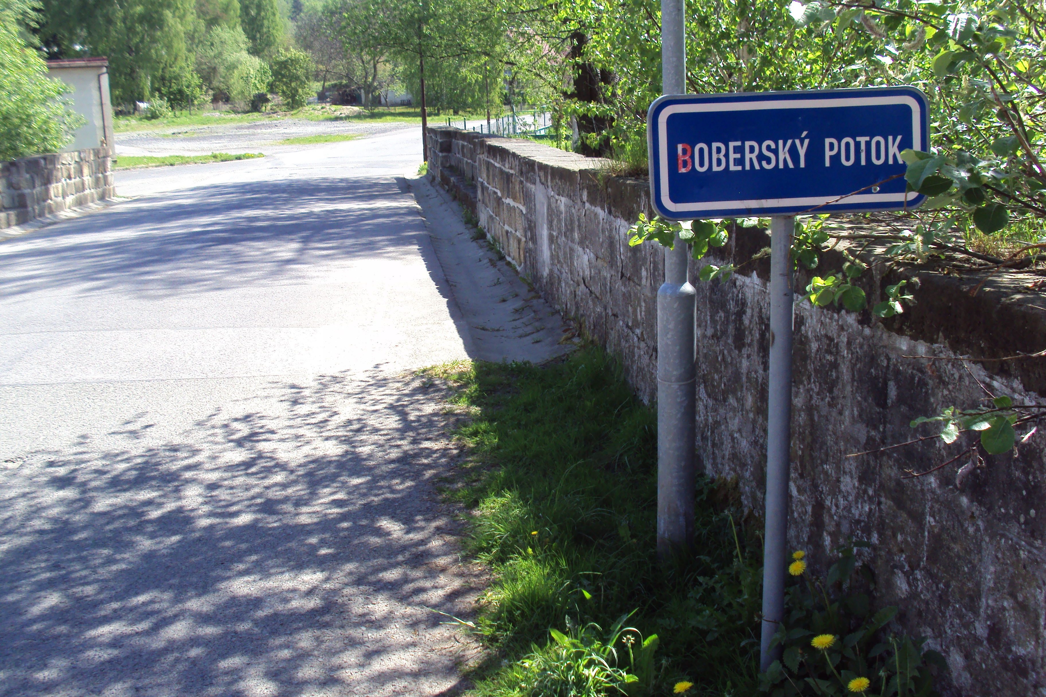 Most přes Boberský potok ve Cvikově